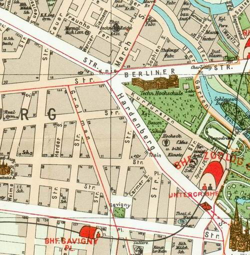 Ausschnitt aus dem Pharus-Plan Berlin von 1902, den Platz "Am Knie" zeigend. Gemeinfrei (Urheberrechtsschutz abgelaufen)